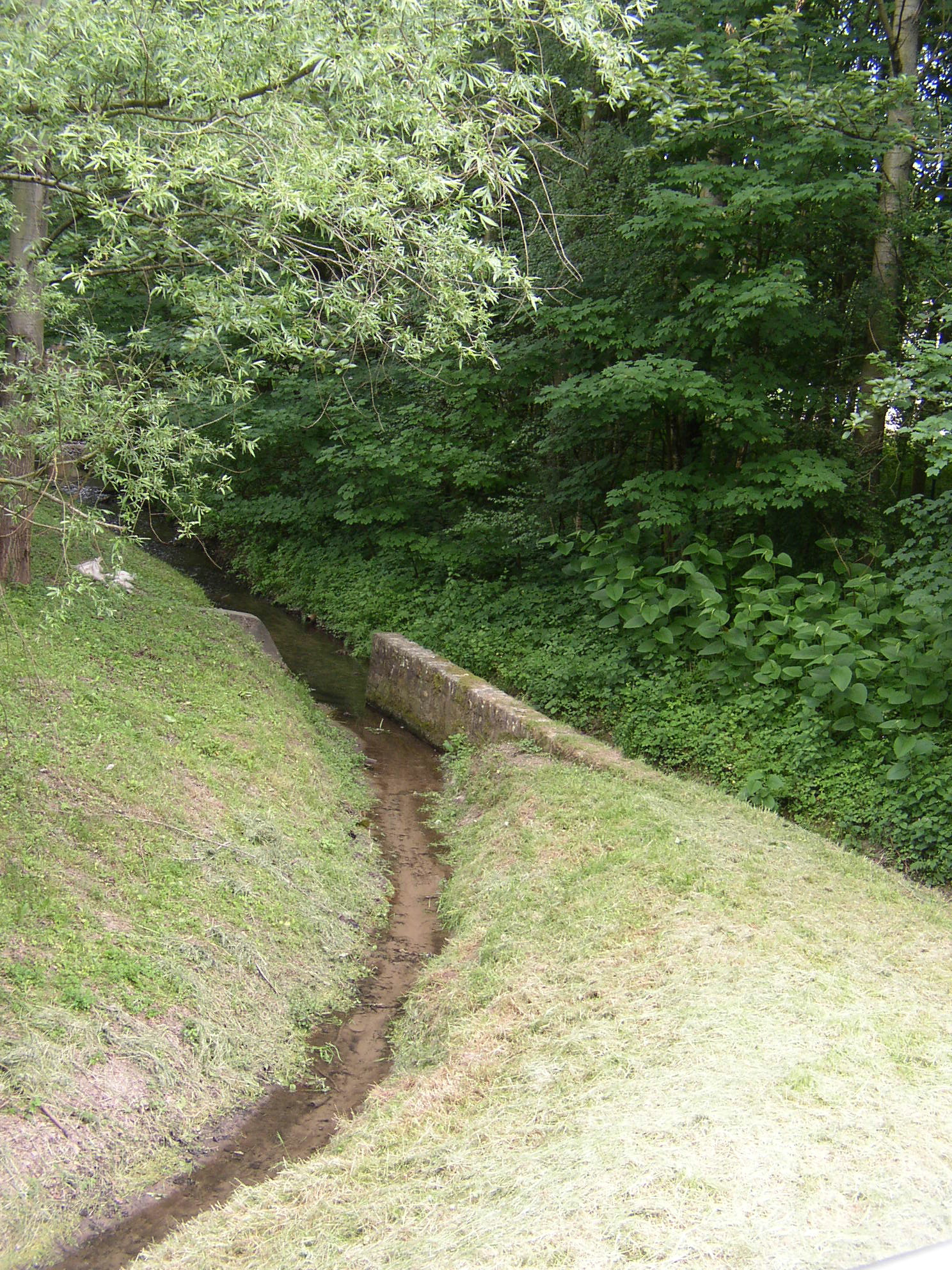 Halle (Westf) - Ruthebach an der Abzweigung vom Laibach